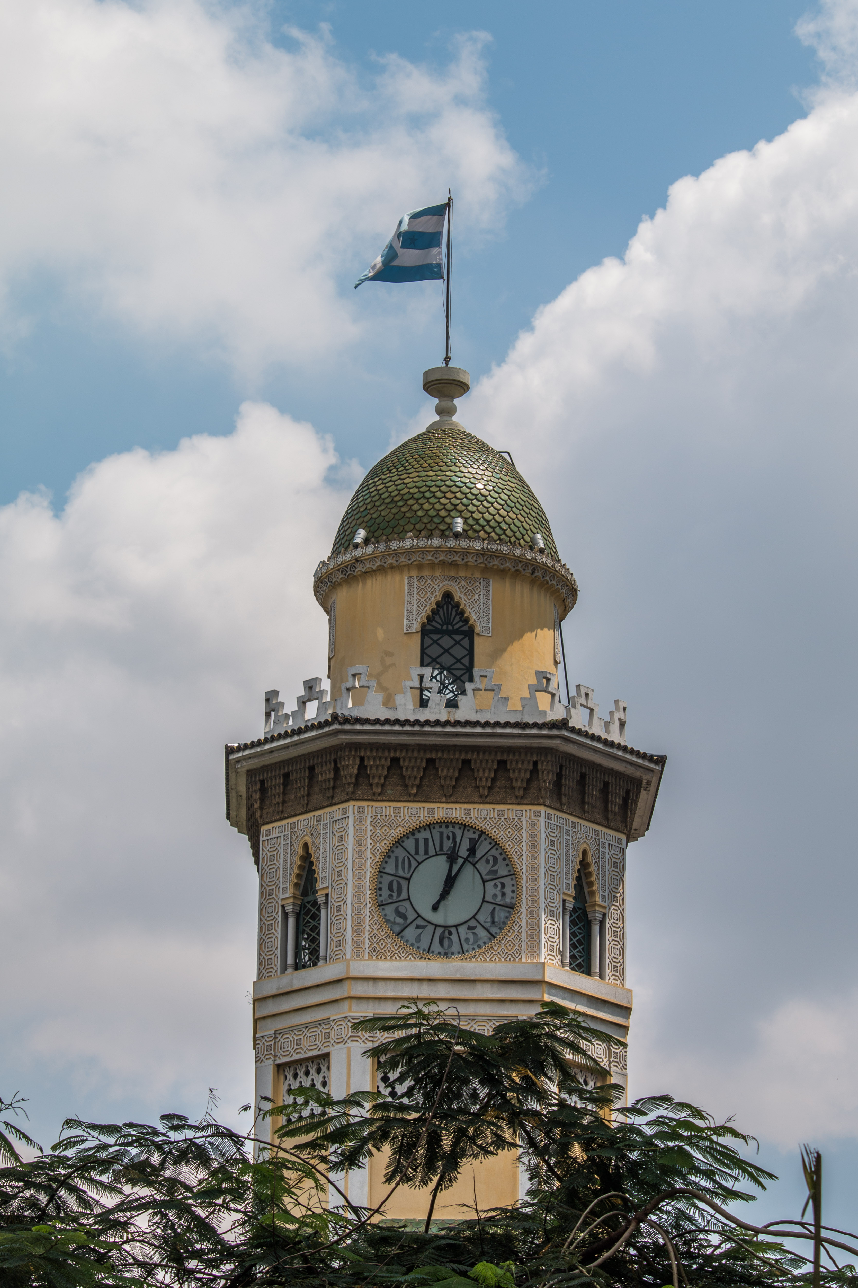 Torre del Reloj o Torre Morisca con bandera de Guayaquil, vista diurna.